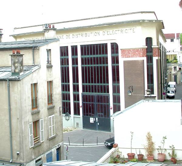 Compagnie Parisienne de Distribution d'Électricité, cour de la Ferme Saint-Lazare, Paris 10